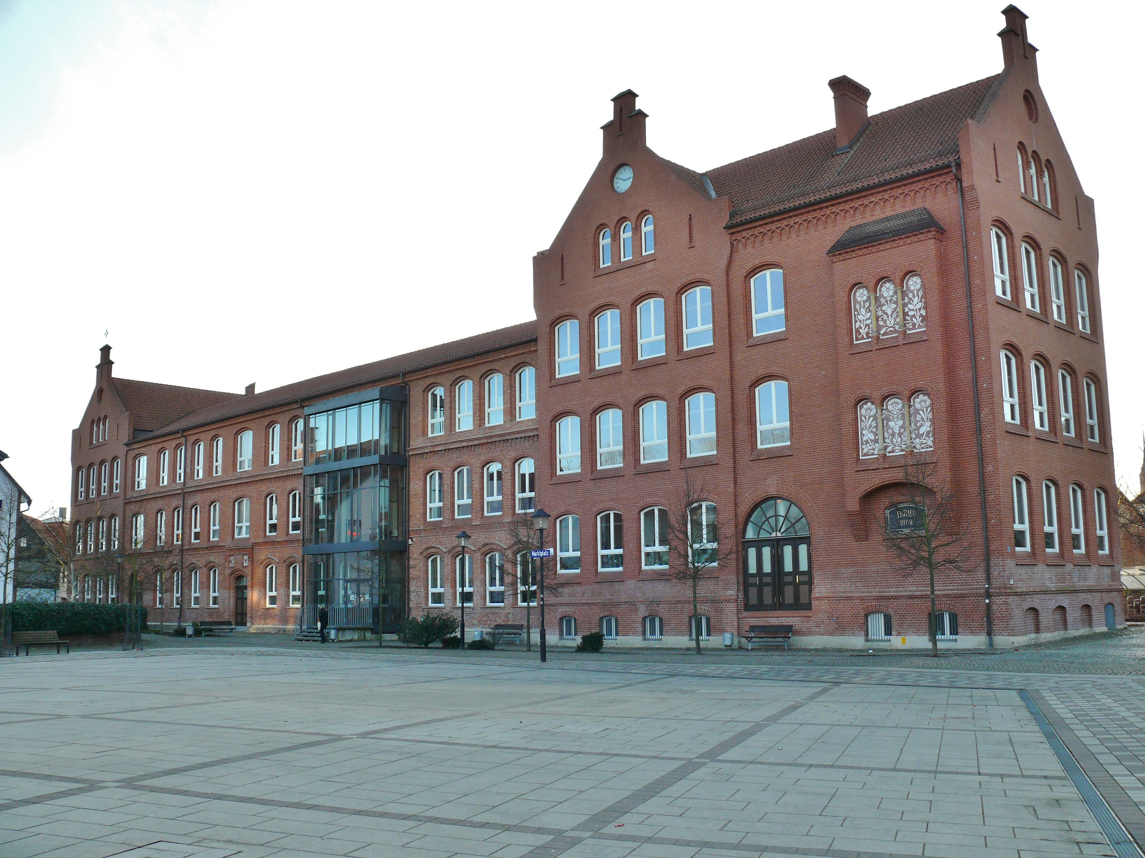 Das Bürgercenter auf dem Marktplatz der Hansestadt Salzwedel.